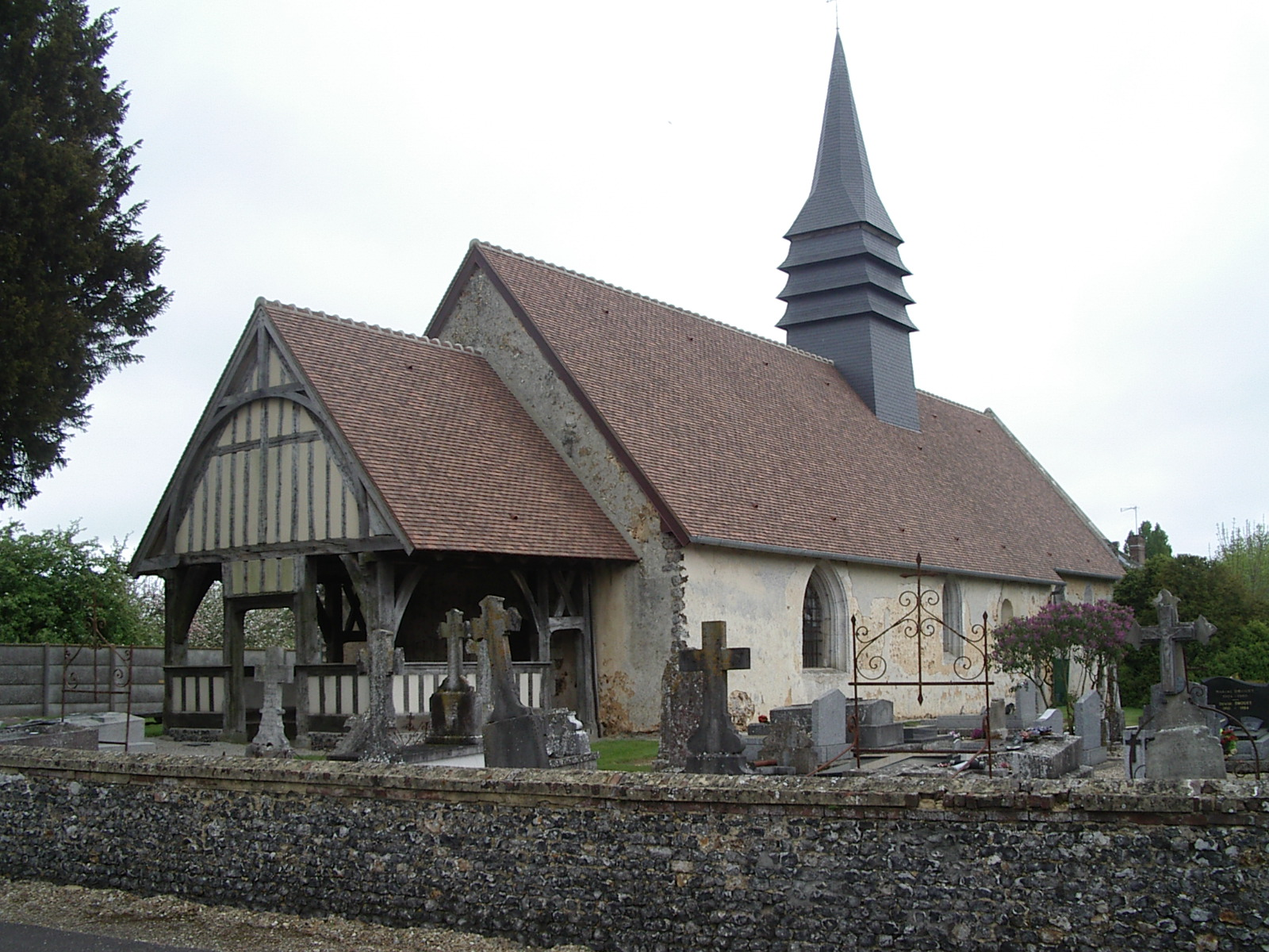 Eglise de Sainte-Marguerite-en-Ouche (France, Eure)